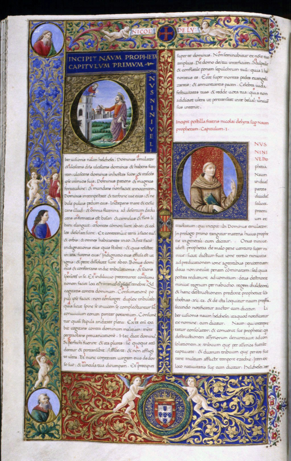 Bíblia dos Jerónimos, página do Vol. V